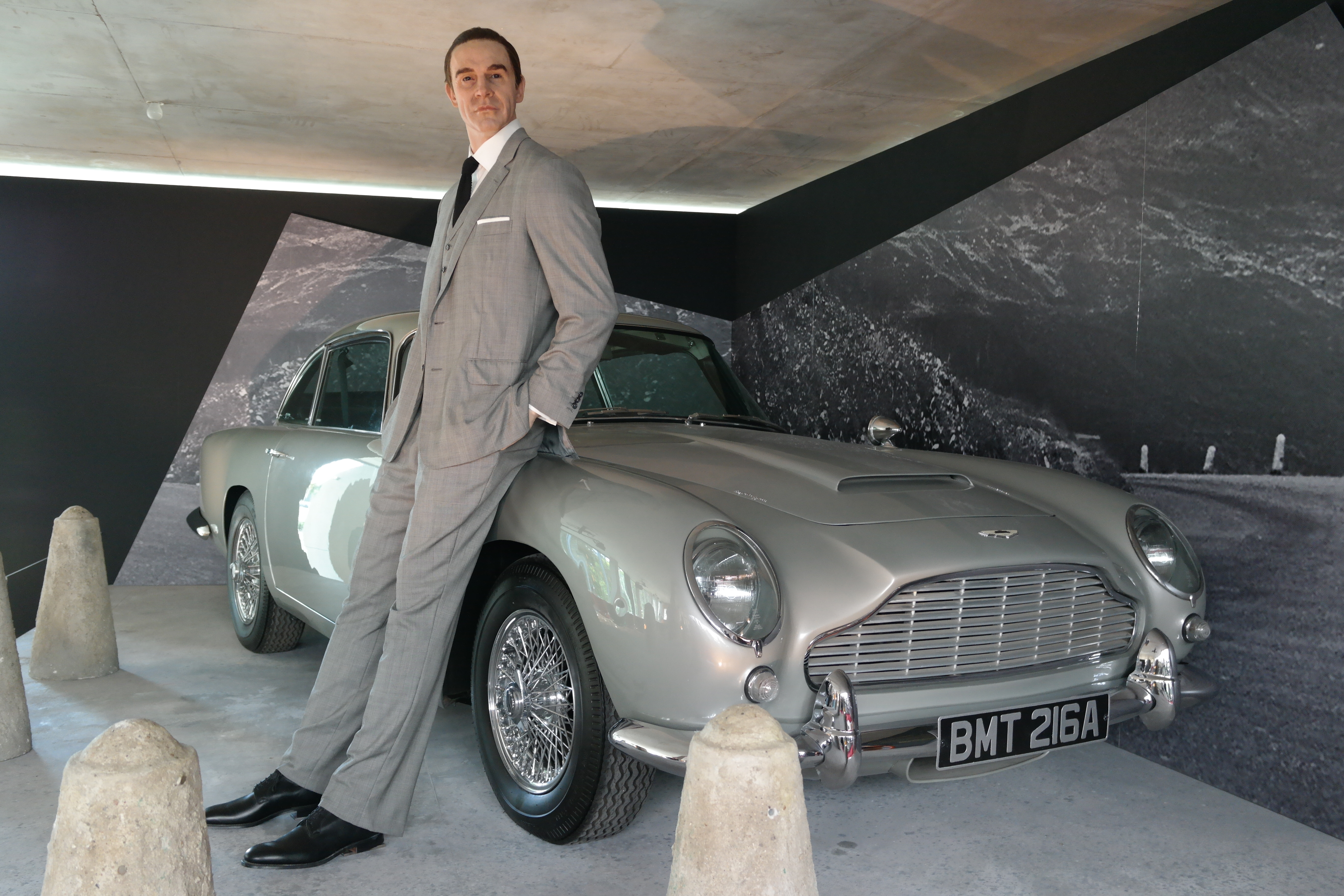 Een beeld van Sean Connery bij een Aston Martin DB5, gefotografeerd in de Kunsthal in Rotterdam tijdens de tentoonstelling Designing 007: Fifty Years of Bond Style.